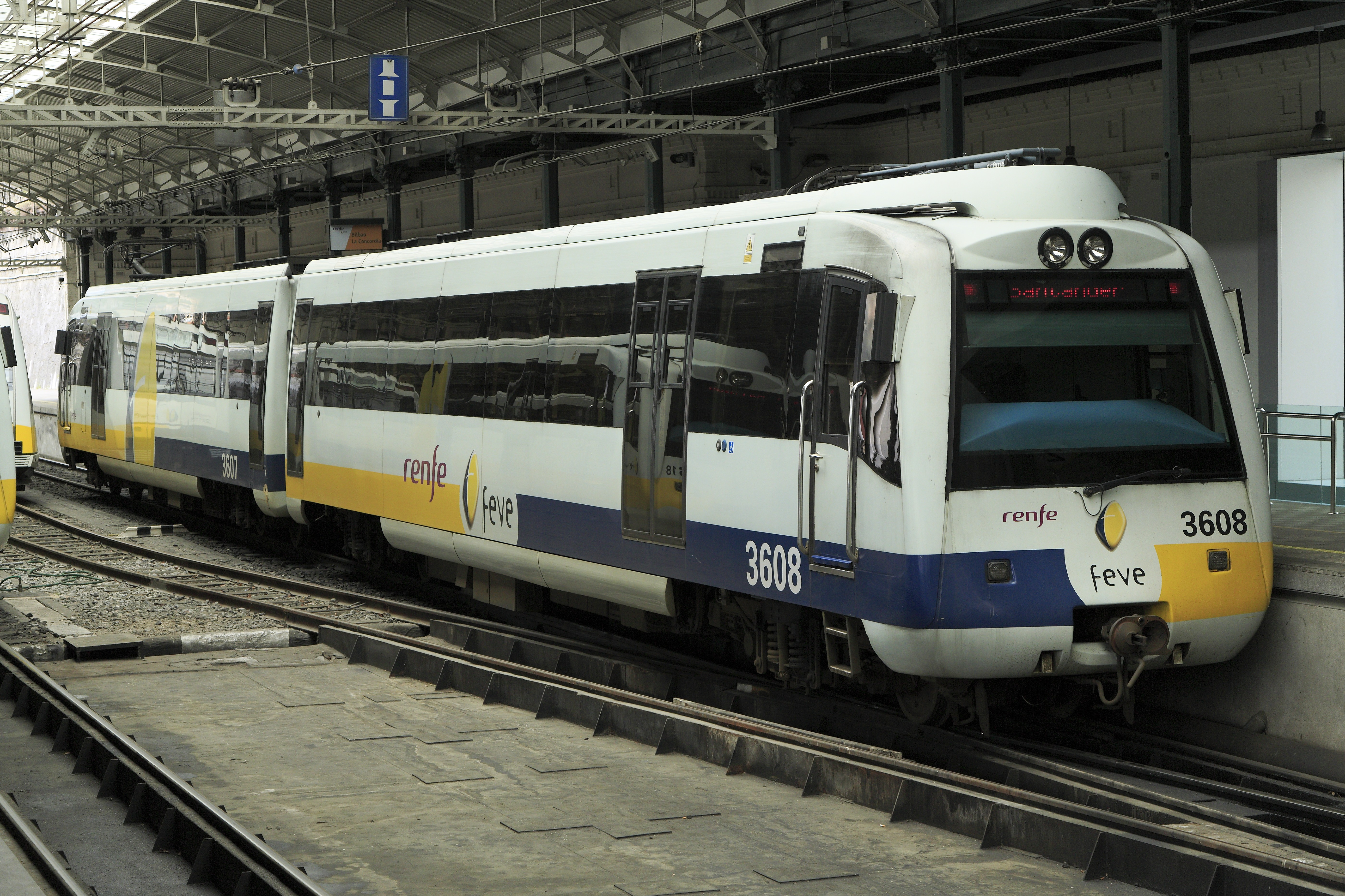 Regionalzug nach Santander. Dass er als ET verkehrt, hat einen einfachen Grund: Zwischen Aranguren und Marrón besteht Schienenersatzverkehr. Zwar war die Schließung der Fahrleitungslücken zwischen Bilbao, Santander und Oviedo beschlossen, doch seit der Finanzkrise ruhen die Arbeiten. Das Fahrzeug ist ein Doppeltriebwagen, die Abkürzung »ES« ist ein Fehler im Dateiname.